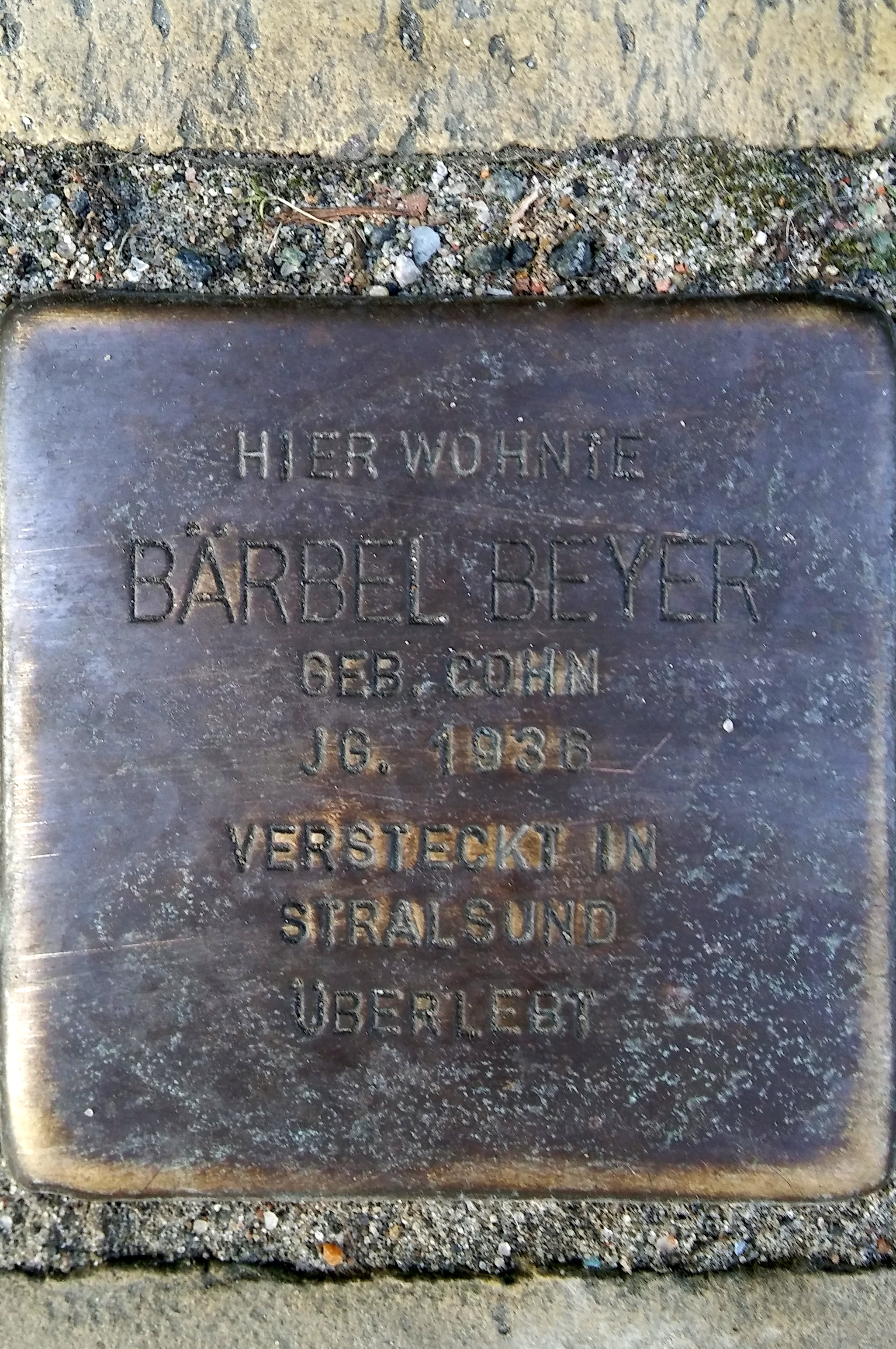 Stralsund, Frankenstraße 72, Stolperstein Bärbel Beyer